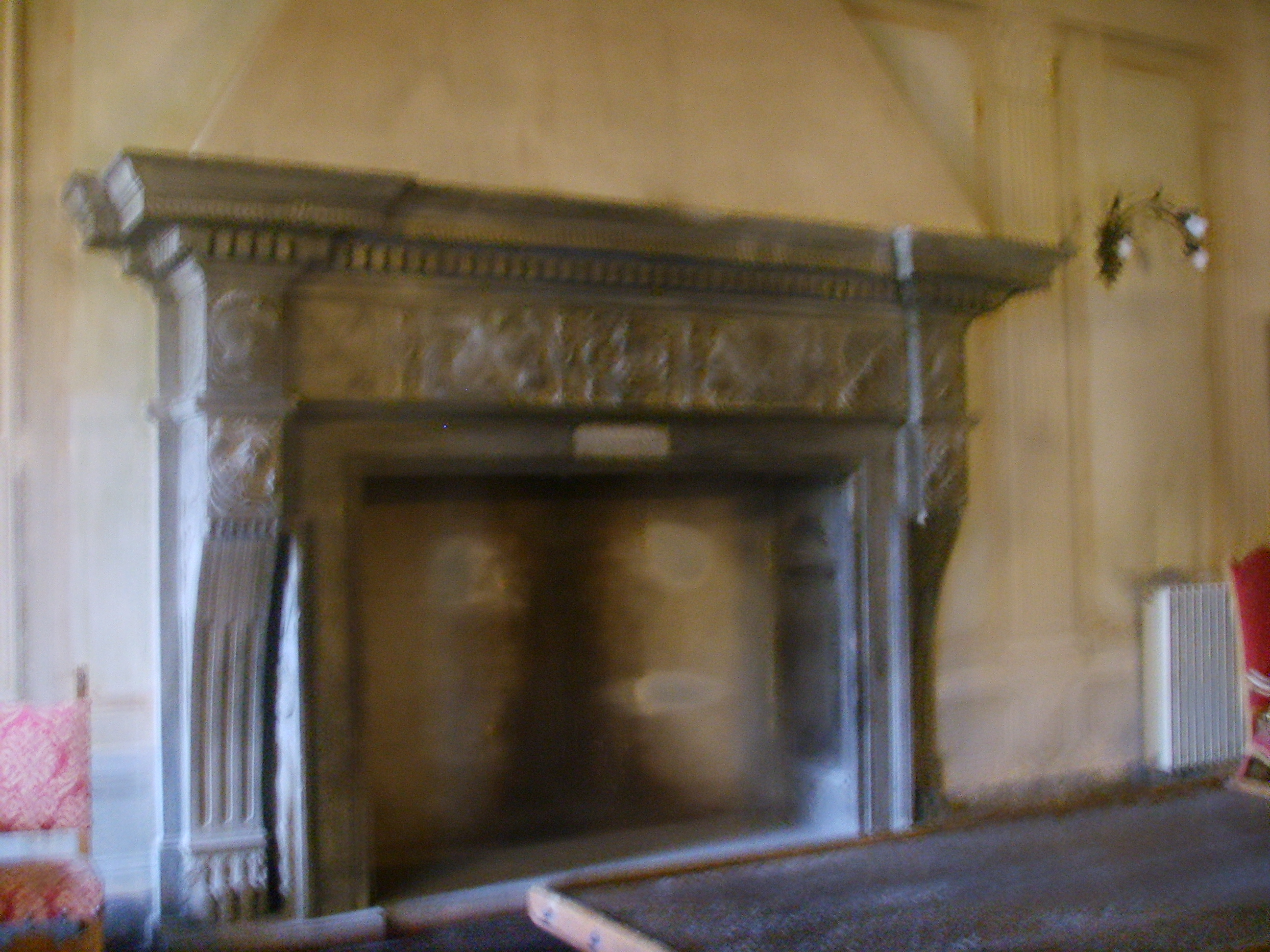 Villa di Careggi in Florence, Italy